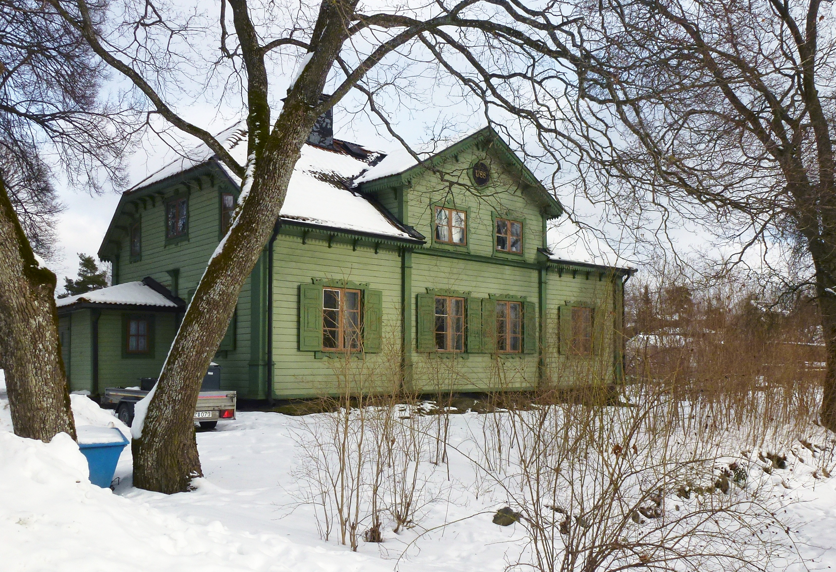 Herrängens gård